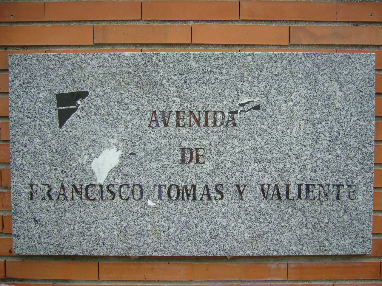 Placa de la avenida Francisco Tomás y Valiente en la Universidad Autónoma de Madrid (UAM). Avenue of Francisco Tomas y Valiente in Autonomous University of Madrid